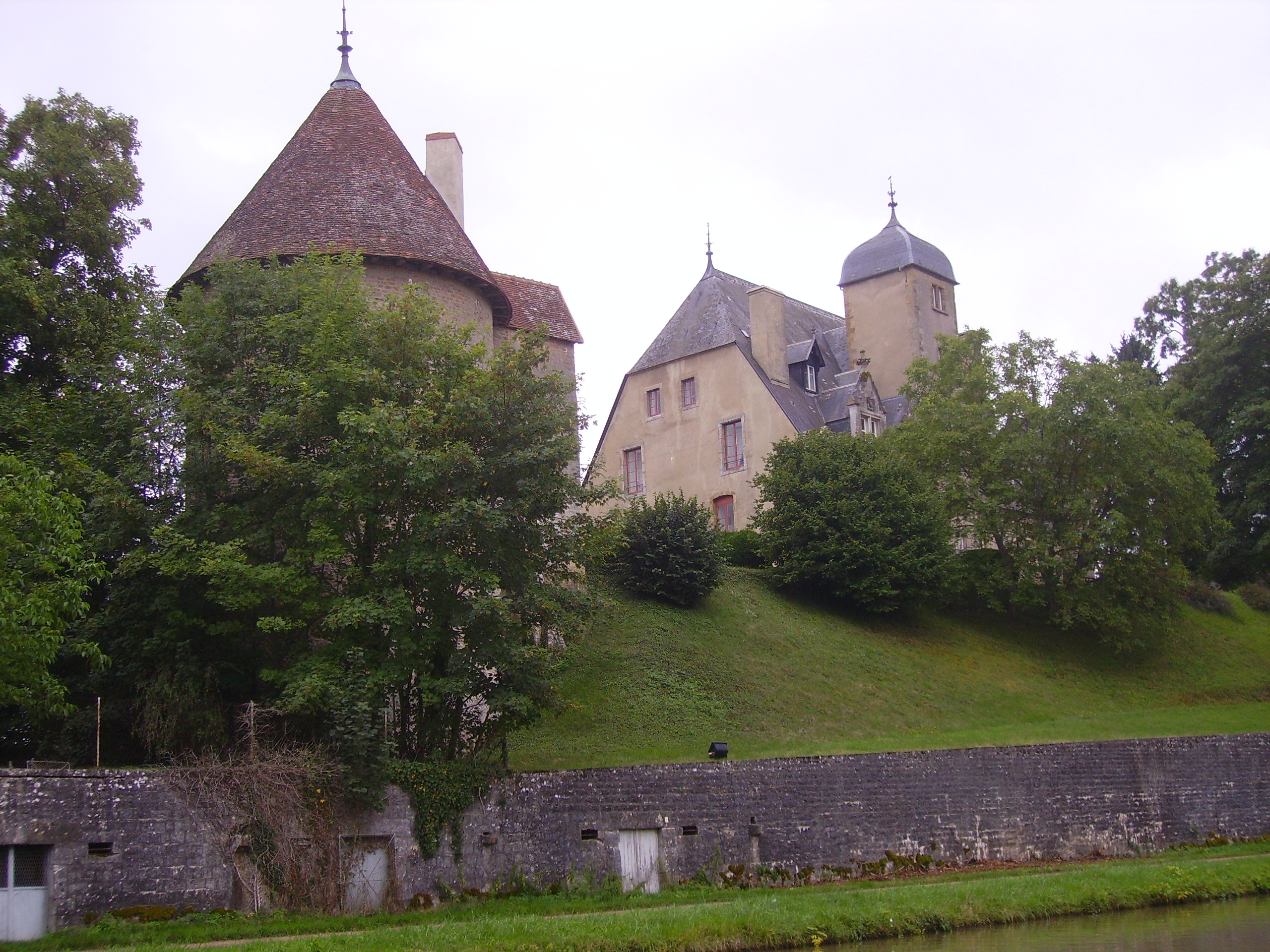 Le château de Châtillon-en-Bazois (France)